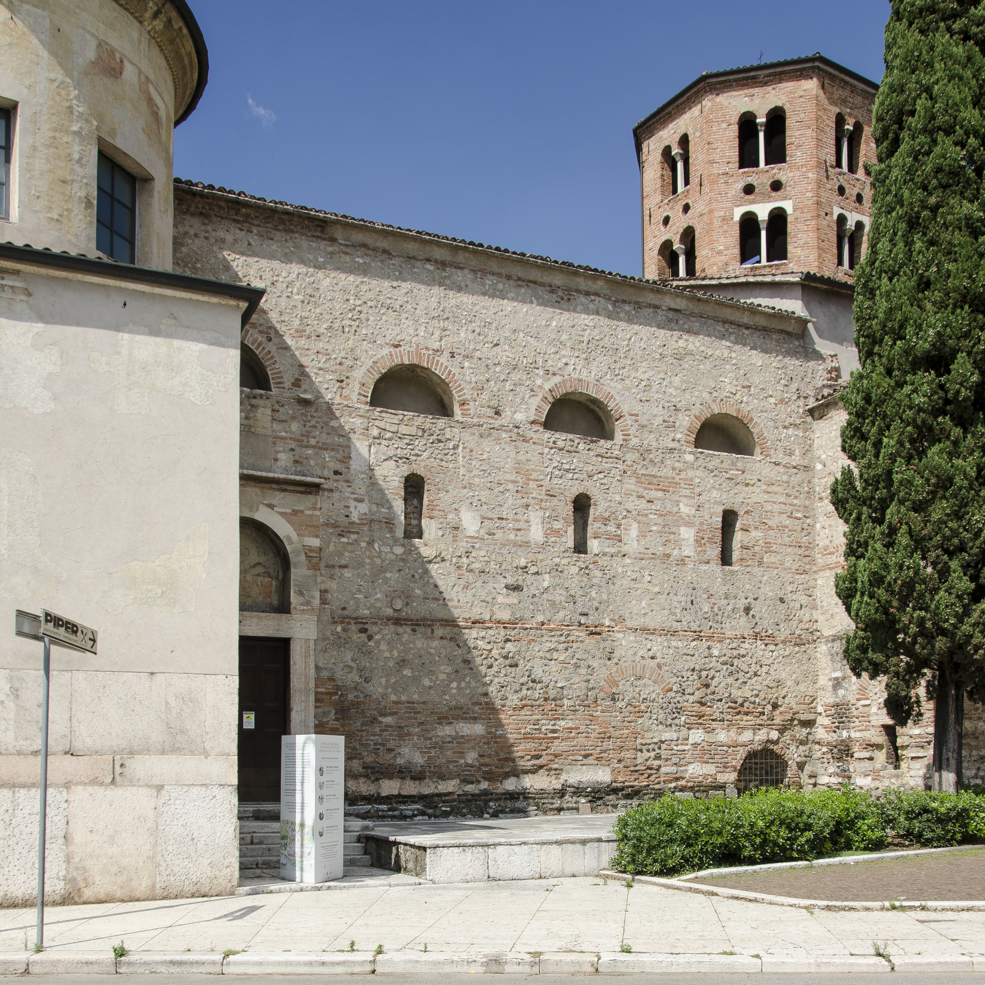 Chiesa di Santo Stefano a Verona, esterno